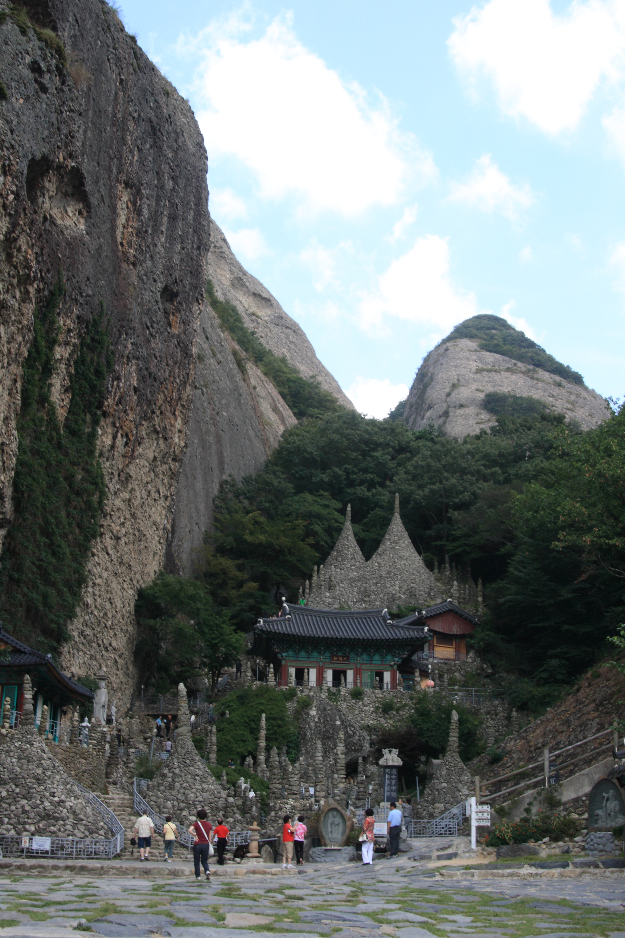 Tapsa im Landkreis Jinan, Nord Jeolla Province, Südkorea